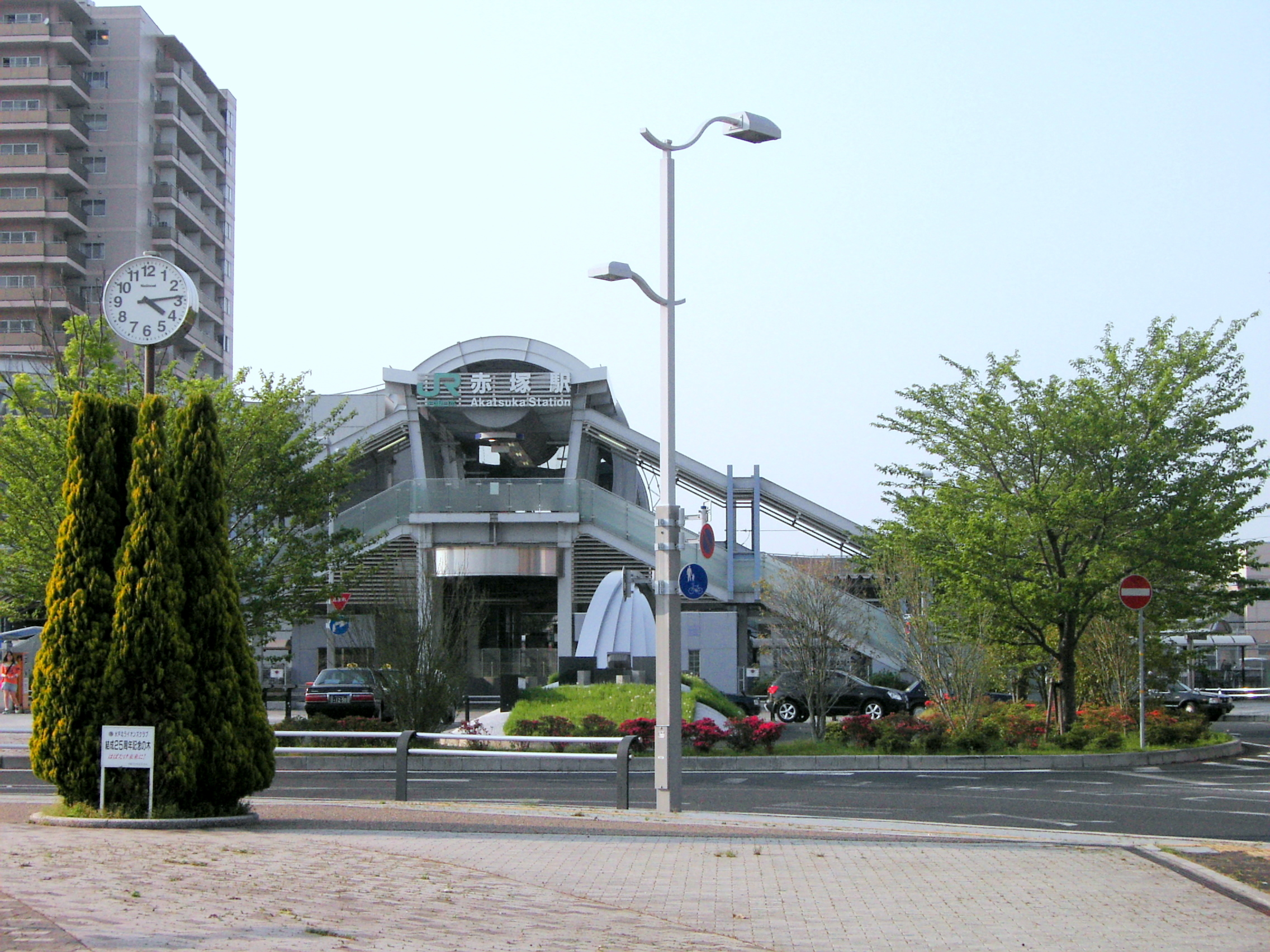 Akatsuka Station （赤塚駅）